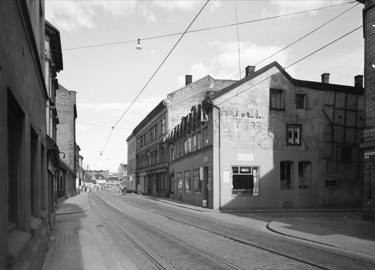 Vognmannsgata fotografert 1961 fra Jernbanetorget ved krysse med Persgangen, mot Schweigaardsgate